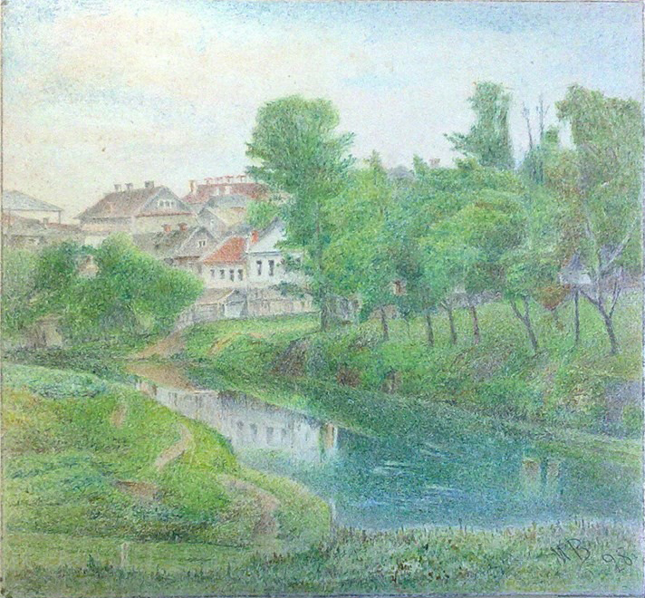 Беларуская (тарашкевіца): Менск (Miensk), вуліца Падзамкавая (vulica Padzamkavaja) з боку ракі Сьвіслачы (Śvisłač)